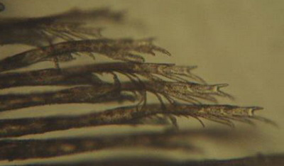 羽小钩 羽毛来自：虎皮鹦鹉 smartneddy 2002年摄